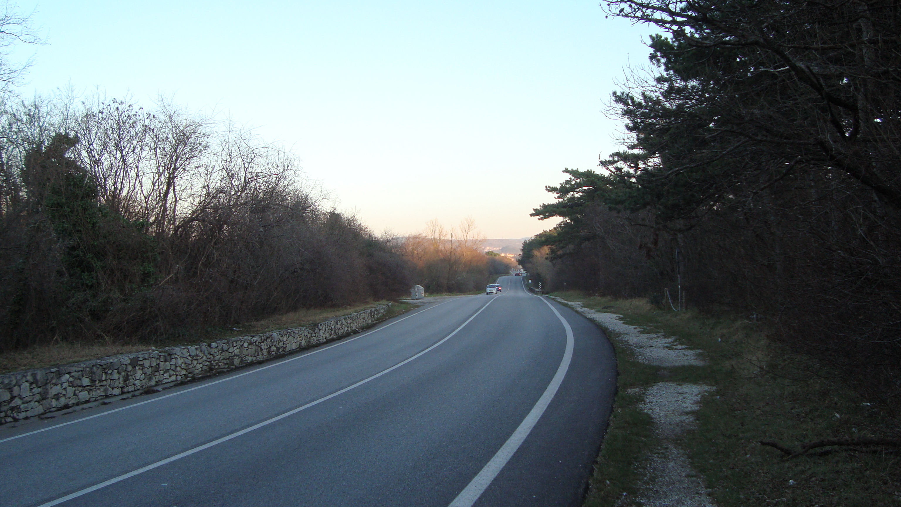 Tratto della SS14 tra Duino e Sistiana